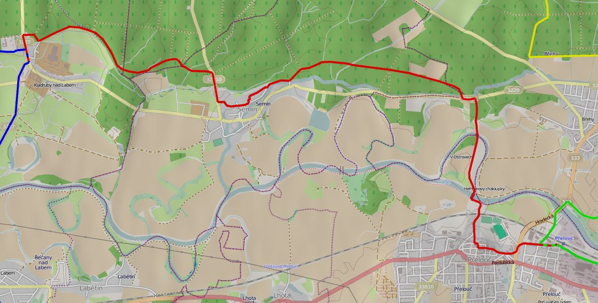 Turistická značená trasa 0434